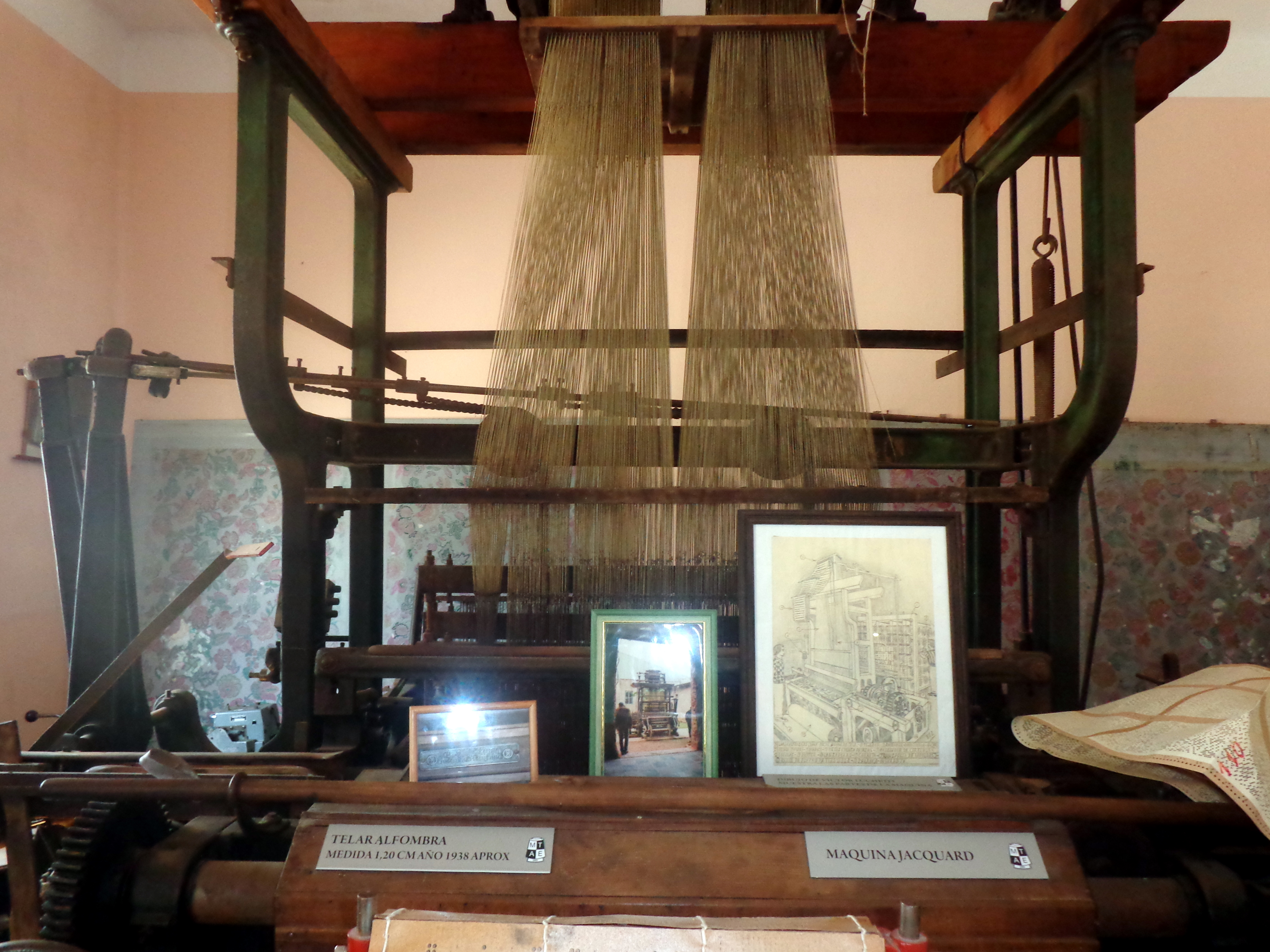 Museo y archivo textil Algoselan Flandria en Parque Industrial Villa Flandria, José María Jauregui, Luján, Provincia de Buenos Aires, Argentina